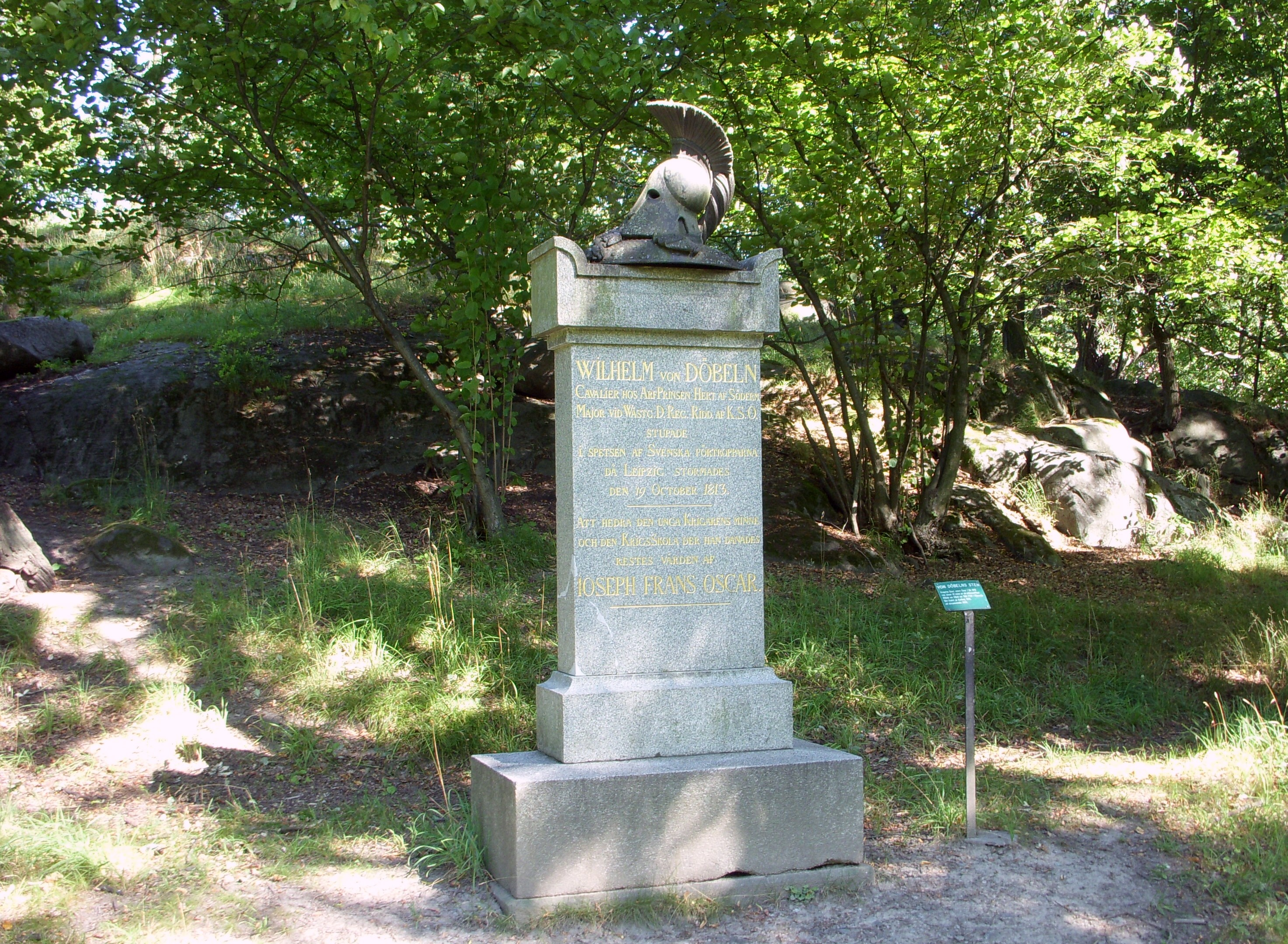 Karlbergs slott, Solna, von Döbelns minnessten